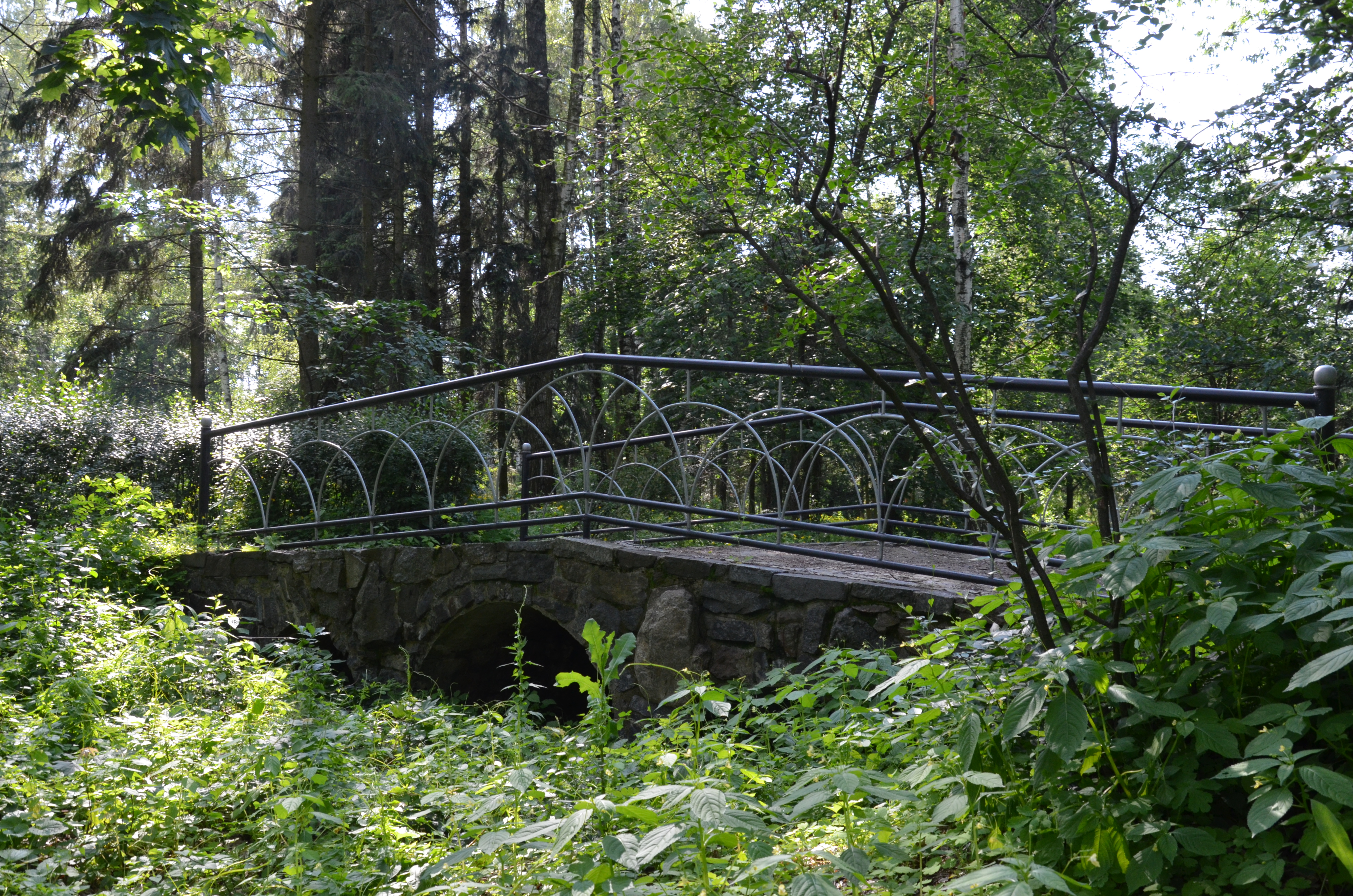 «Жорнівський», Києво-Святошинський район, Жорнівська сільська рада